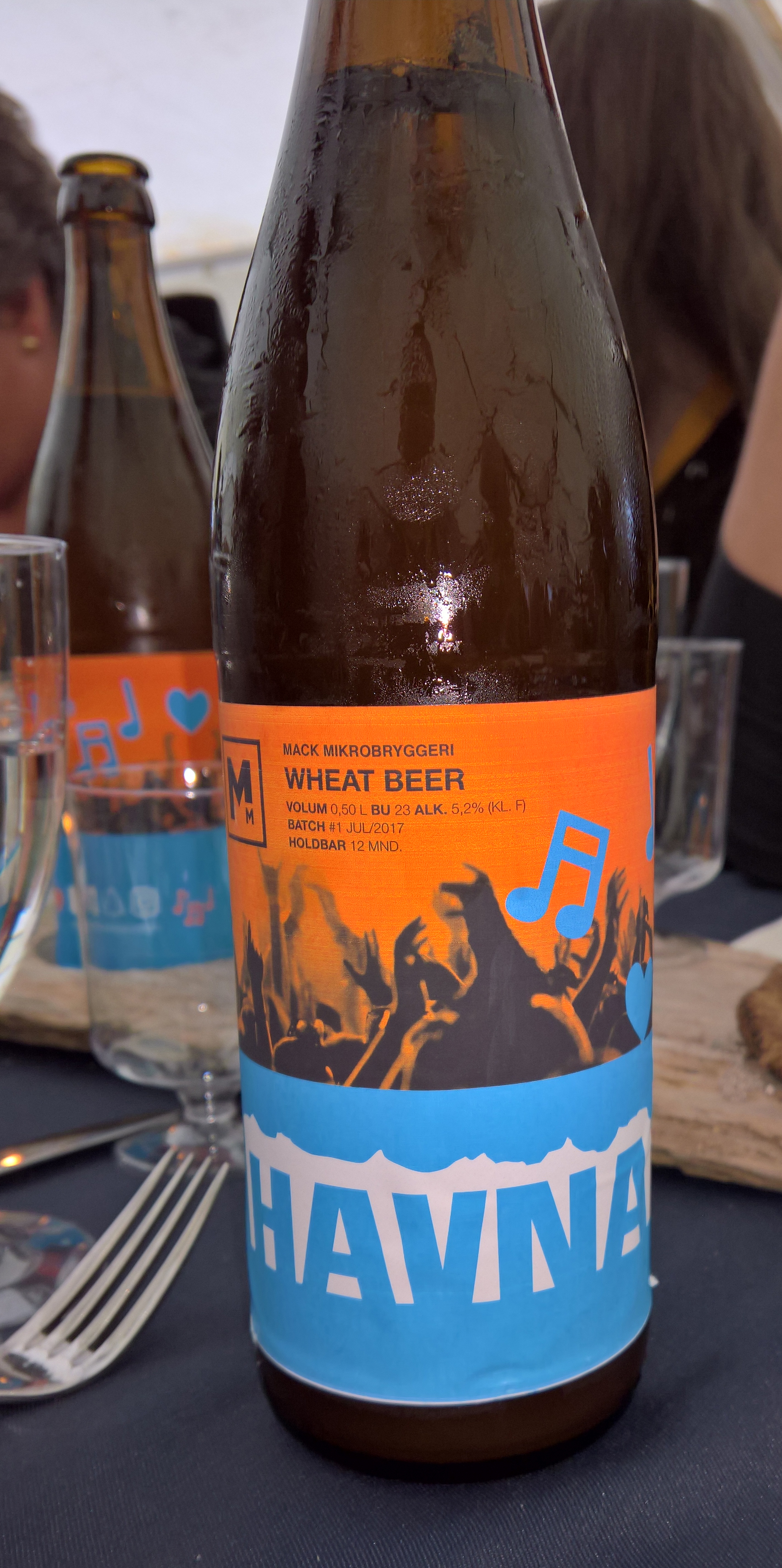 Øl som ble produsert i forbindelse med Havnafestivalen 2017 i Sandnessjøen. Produsert av Mack.